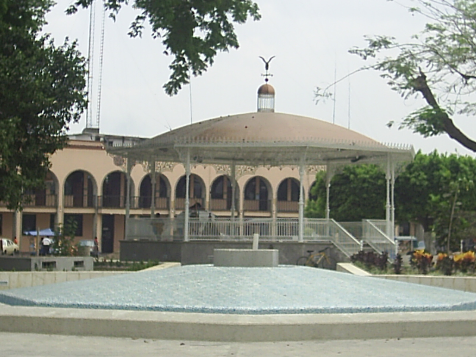 kiosko del Parque Juárez de Tuxtepec Oaxaca